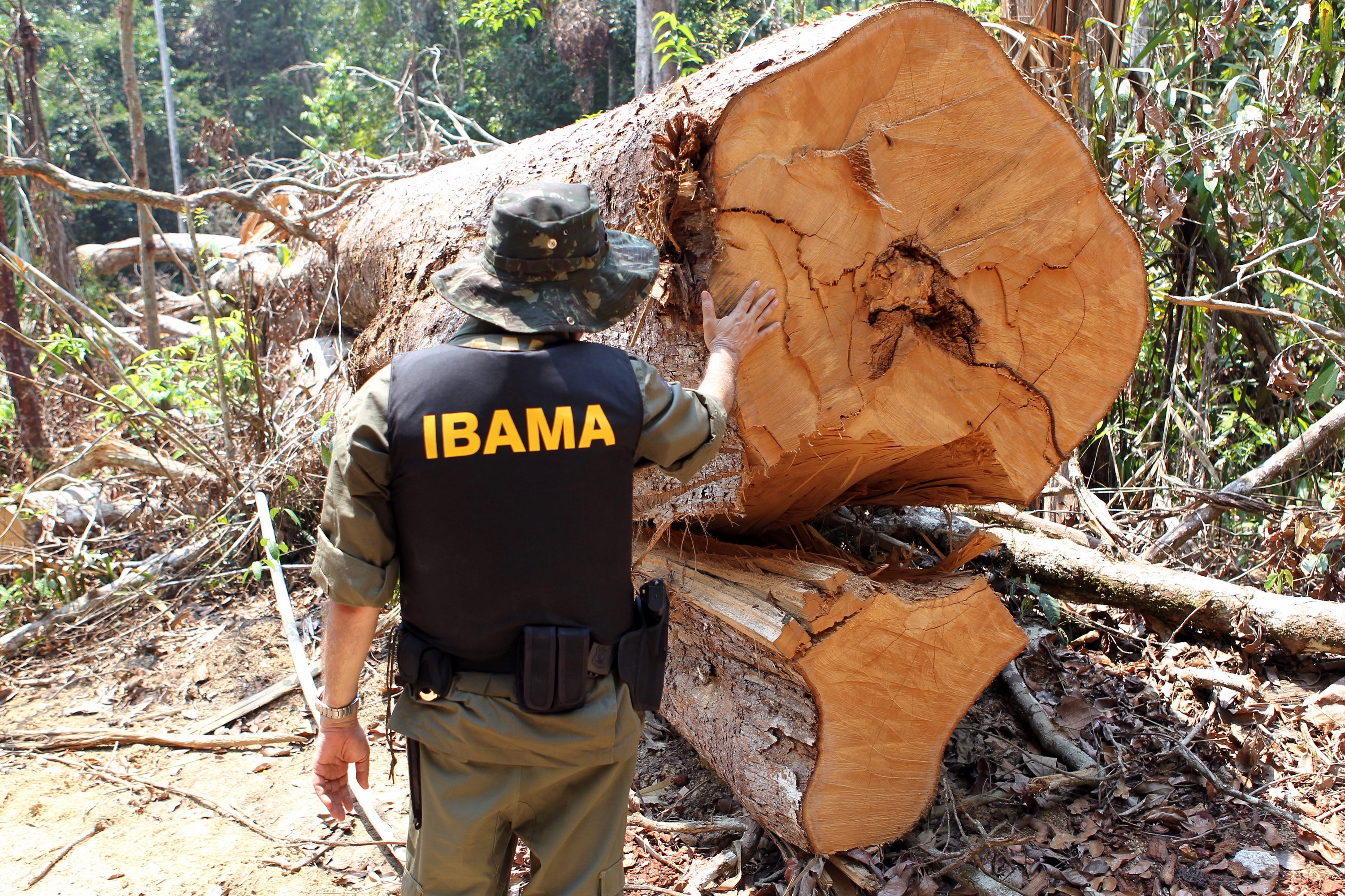 Após denúncia de índios Kayapó, Ibama embarga garimpo que poluía rios Curuá e Trairão em Altamira/PA. Foto: Felipe Werneck - Ascom/Ibama